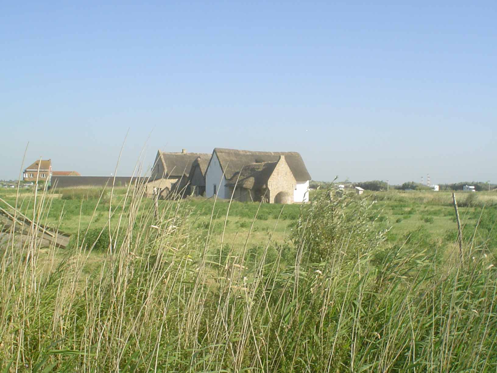 Gereconstrueerde vijftiende eeuwse vissershuisjes op de archeologische site Walraversijde. Foto: Jeffrey De Keyser.